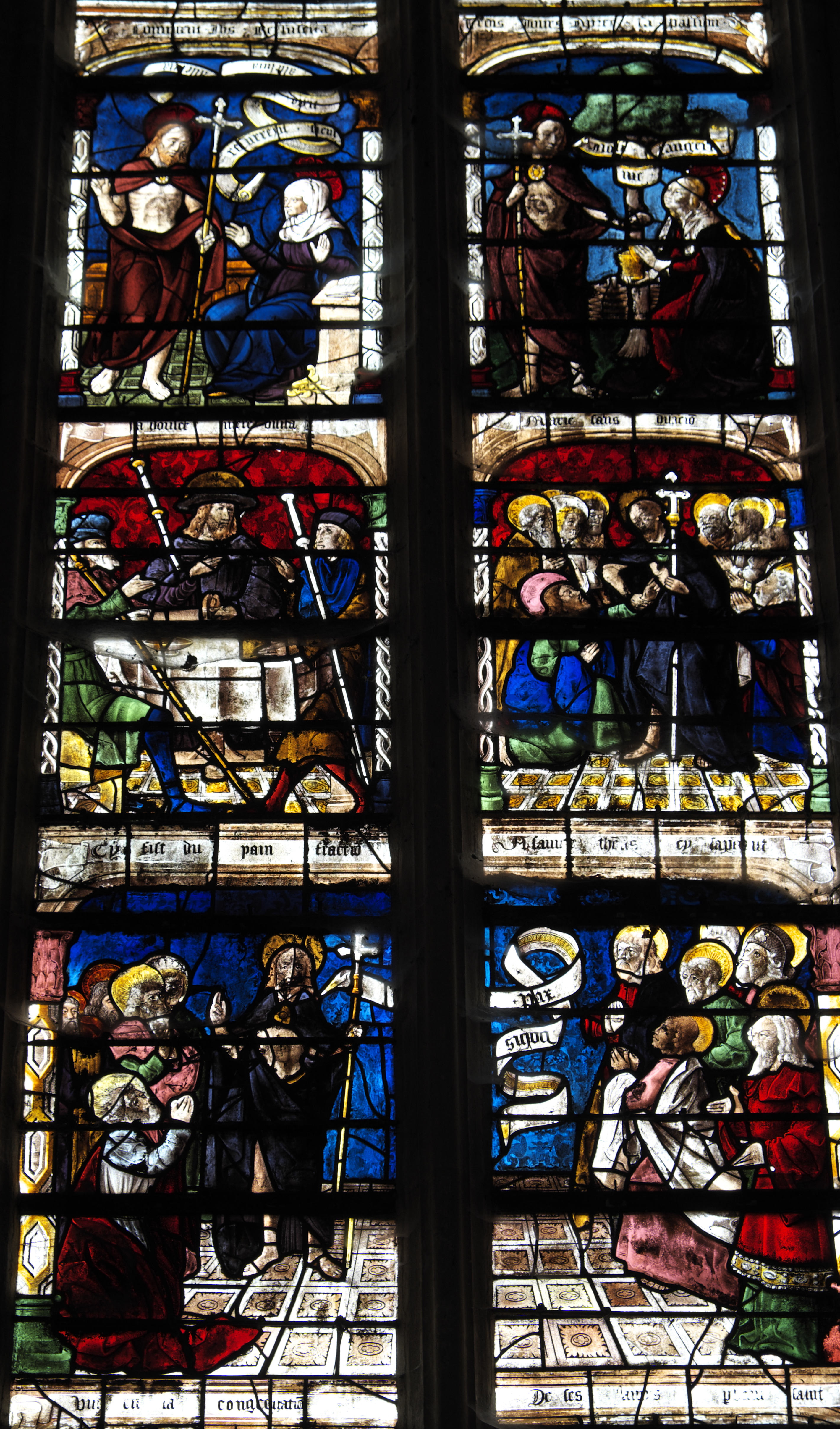 Katholische Kirche Saint-Remi in Ceffonds im Département Haute-Marne (Champagne-Ardenne/Frankreich), Bleiglasfenster (baie 2) im Chor, von 1512; Darstellung: Auferstehung und Erscheinungen Jesu (Ausschnitt) .